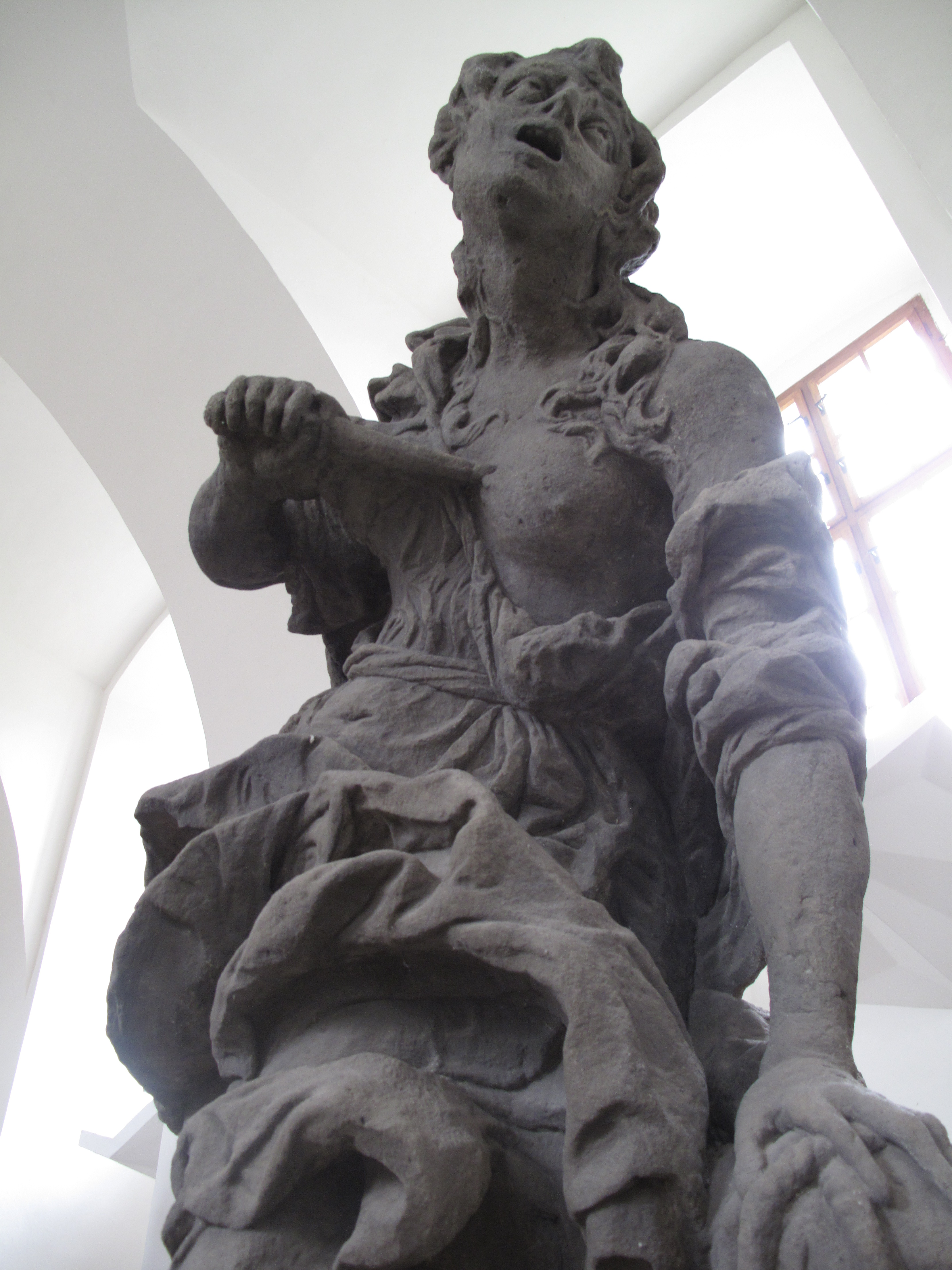 Matyáš Bernard Braun, Zoufalství (Neřesti) detail - originál lapidárium Kuks